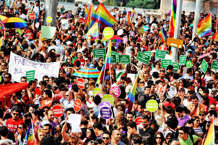 LGBT Onur Haftası, 21. LGBT Onur Yürüyüşü, 2013, Taksim, İstanbul.